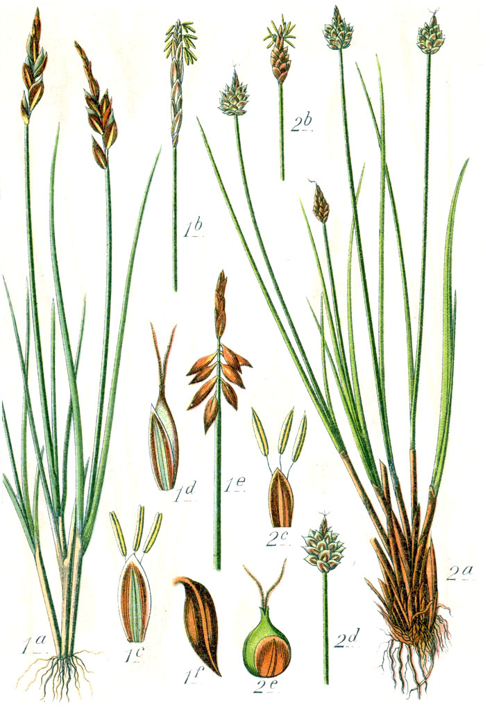 1. Carex pulicaris L., 2. Carex capitata Sol. Original Caption 1. Floh-Segge, Carex pulicaris 2. Kopf-Segge, C. capitata